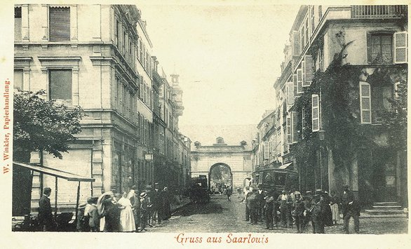 Blick vom Großen Markt in die Deutsche Straße, im Hintergrund das Proviantmagazin Saarlouis